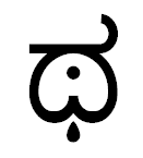 каннада тха